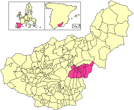 Situación de la Mancomunidad del Marquesado del Zenete respecto a la provincia de Granada, en España.